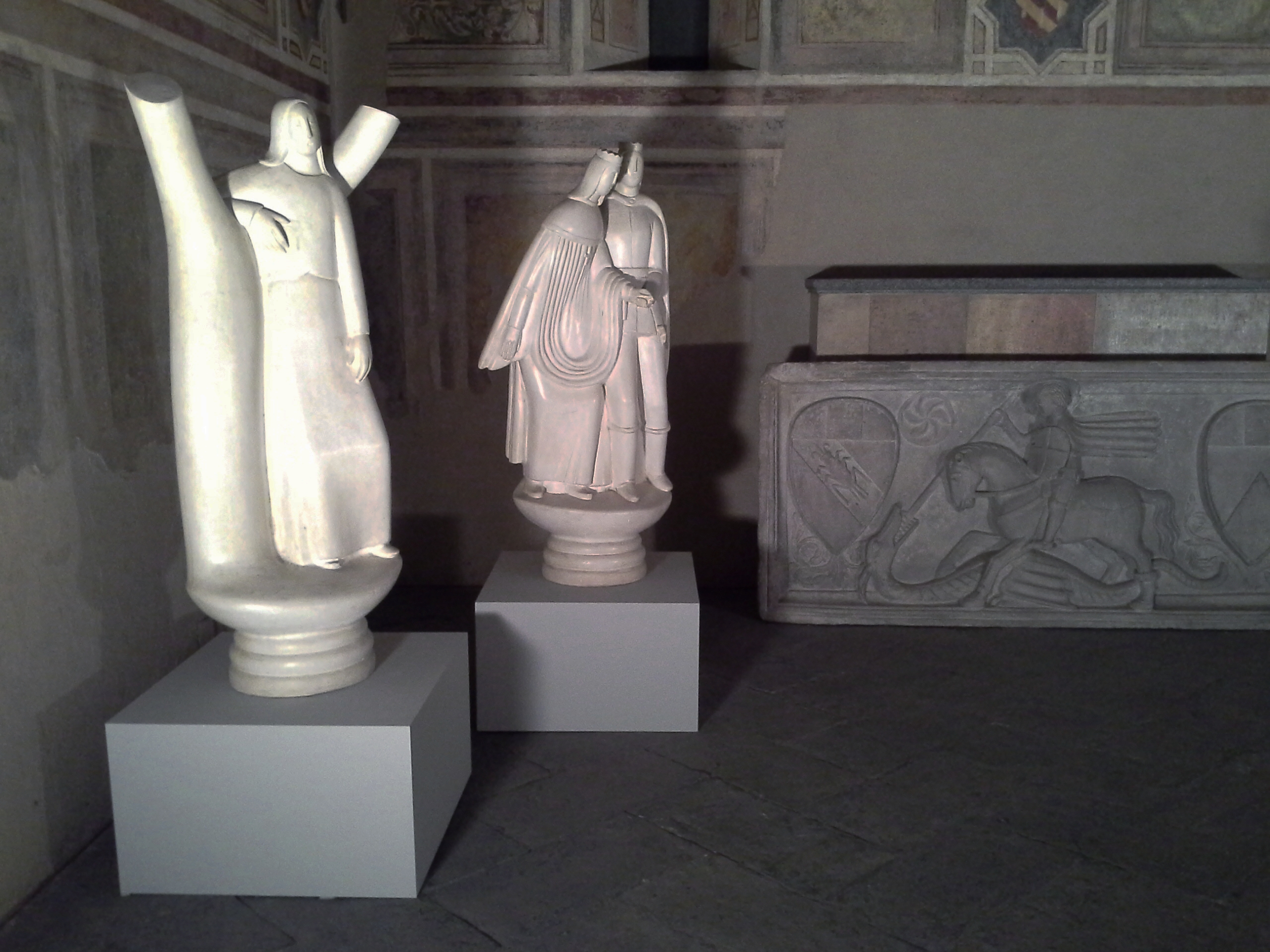 Arturo Martini, Trilogia dei Re (esposizione nella Sala 1a - Oratorio di Mocchirolo).